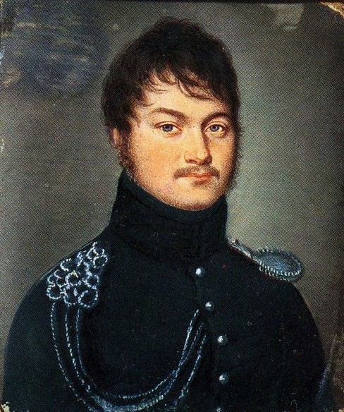 Степан Никитич Бегичев (1785-1859), полковник.